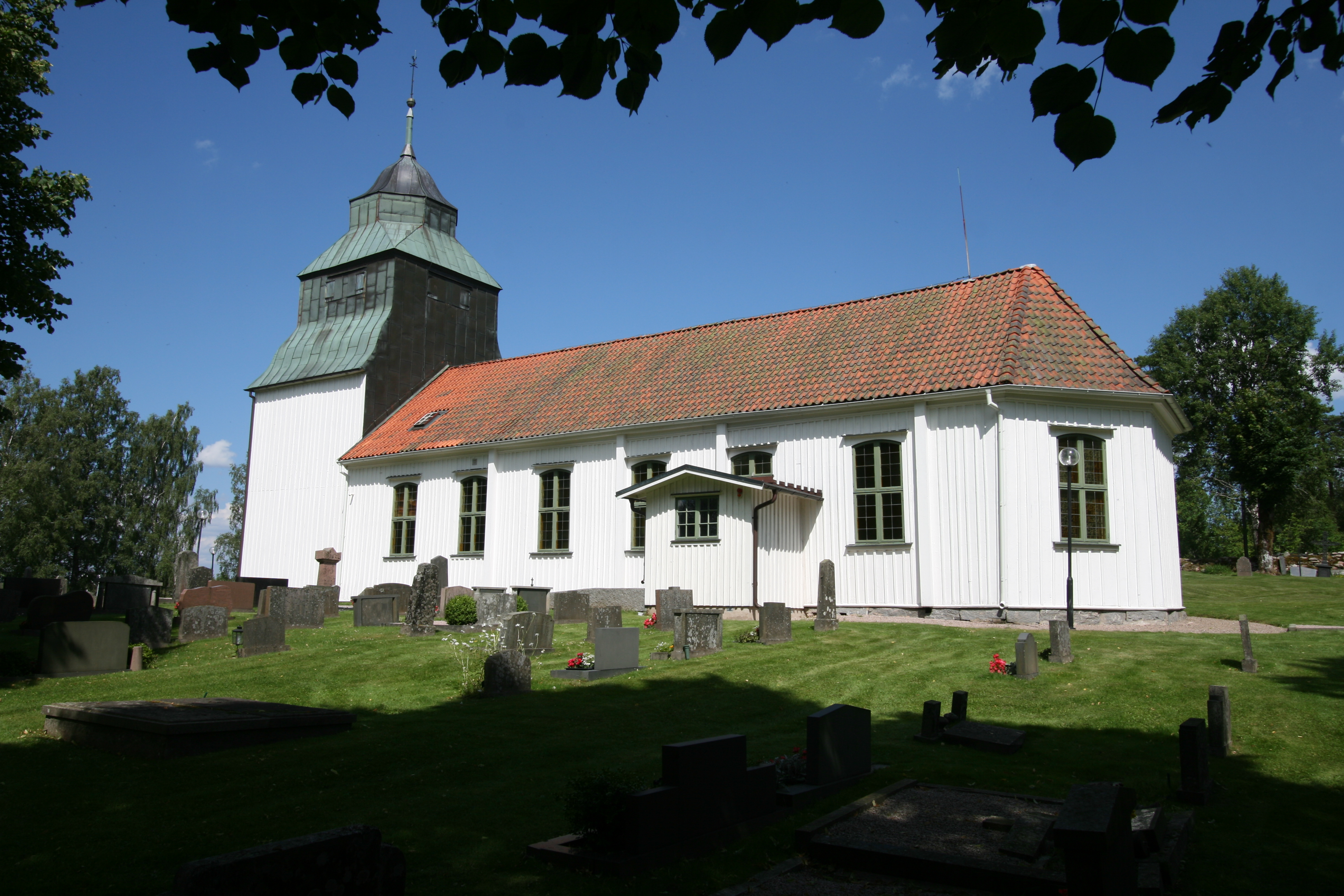 Ljushults kyrka